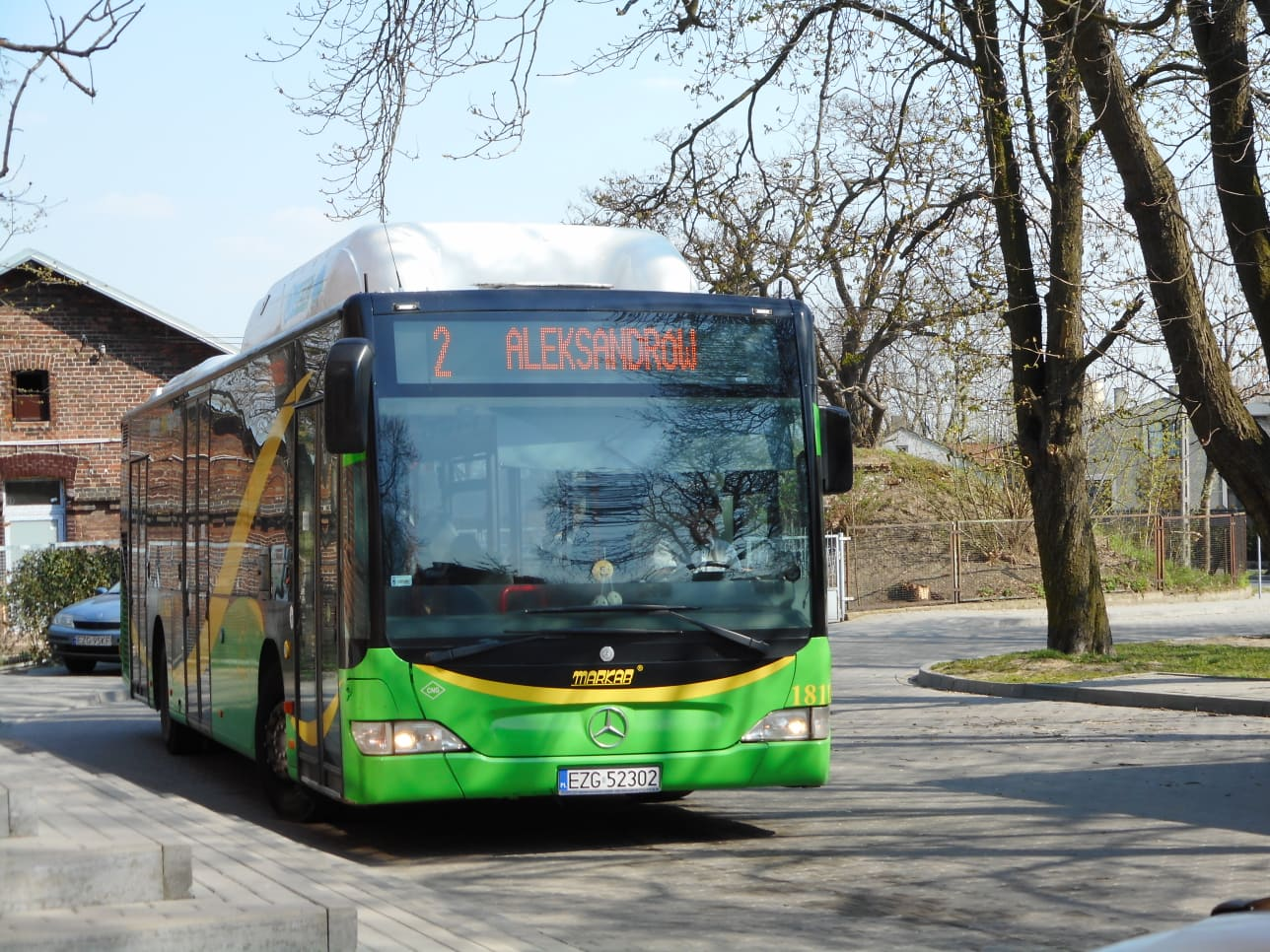 Mercedes O530 CNG stoi na krańcówce autobusowej przy dworcu kolejowym w Strykowie